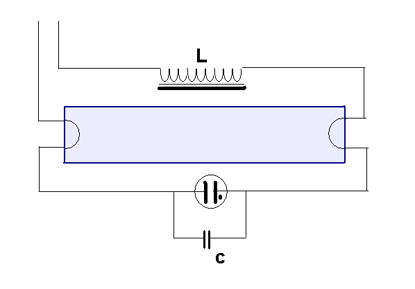 Schema TL-buis; eigen werk; aangeboden onder GFDL